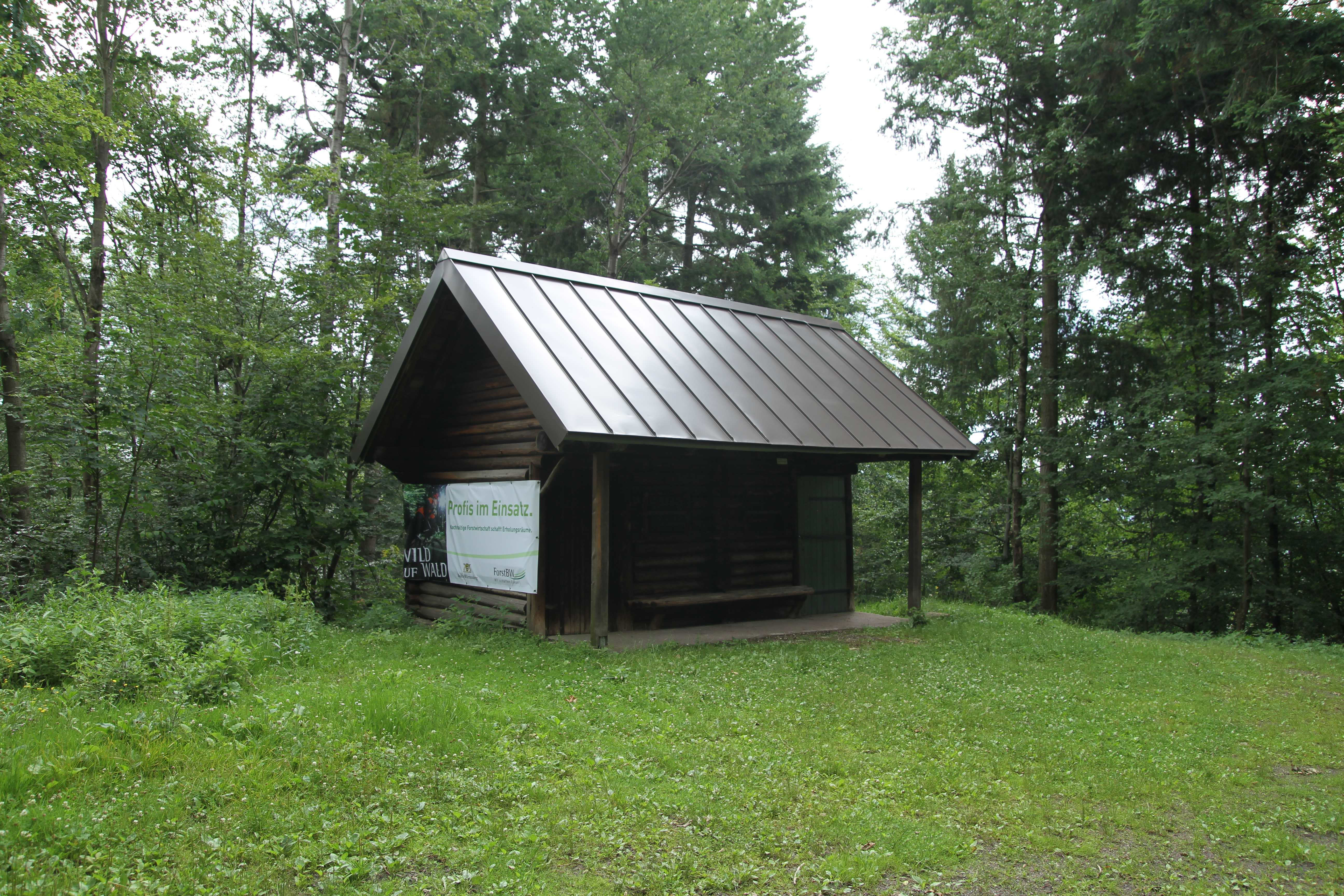 Die Wolfsschluchthütte zwischen Gaggenau und Baden-Baden.